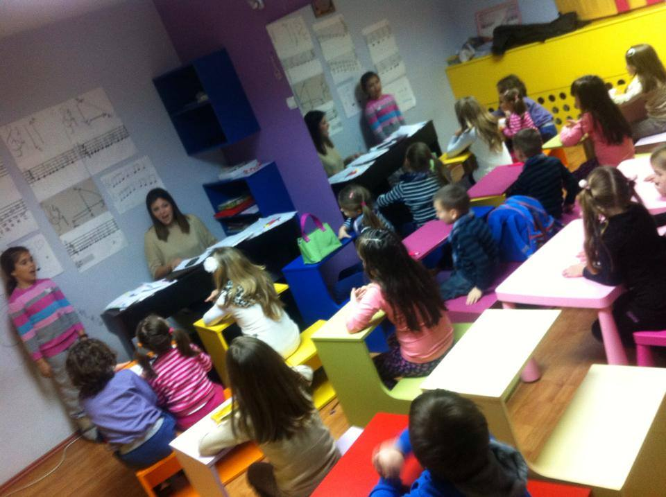 Српски (ћирилица): Музичка радионица Мари Мари у Спортском центру „Шумице""